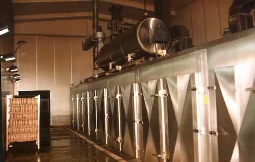 Wędzarnia w przemysłowa, autor W.Grabowski